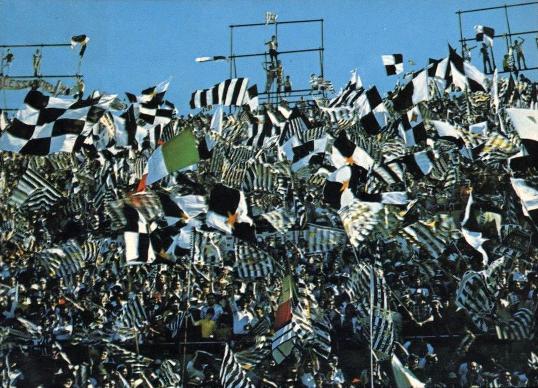 Torino (Italia), stadio Comunale, 1973 circa. Tifosi della Juventus F.C. in curva Filadelfia.